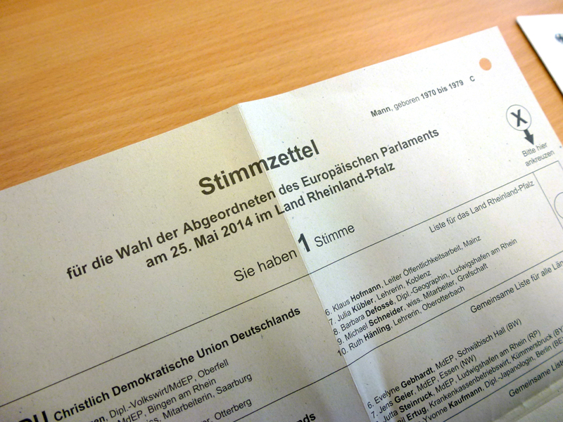 Stimmzettel für die Europawahl 2014. Ausgewählte Briefwahlbezirke werden statistisch erfasst. Daher ist dieser Stimmzettel in der rechten oberen Ecke entsprechend markiert. Hier lautet die Markierung: "Mann, geboren 1970 bis 1979 C"